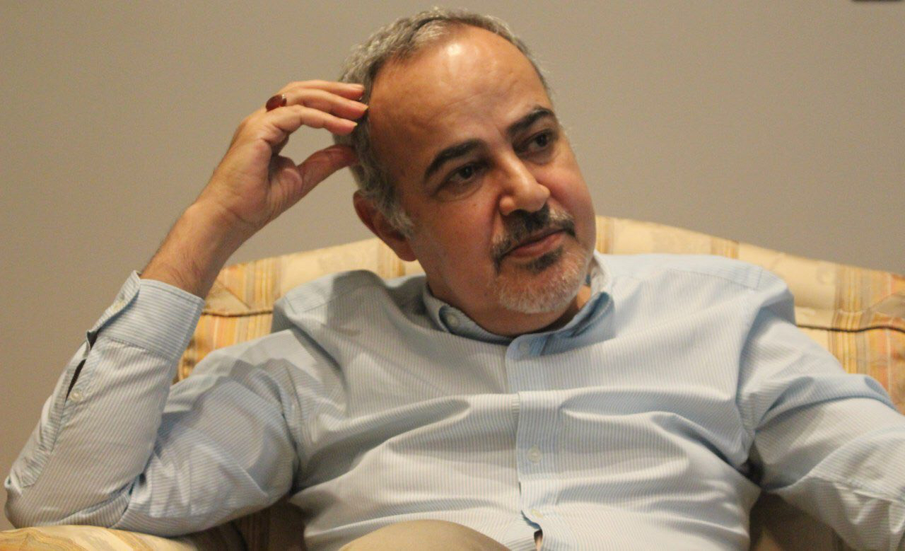 محمد حسن ملک مدنی